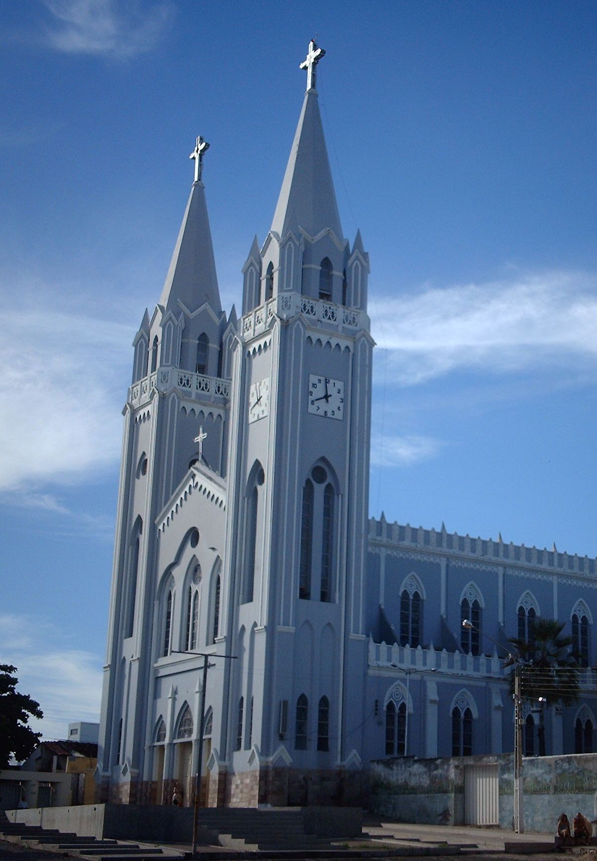 Die Kathedrale Nossa Senhora dos Remédios ("Maria-Hilf") in der brasilianischen Stadt Picos